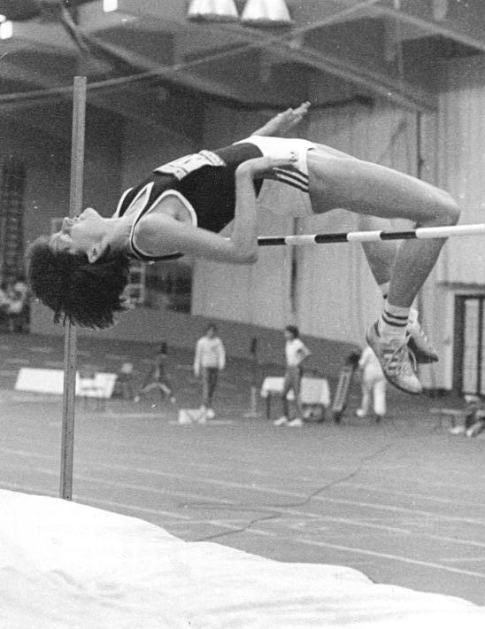 Susanne Beyer-Helm ADN-ZB Weisflog 8.2.87 Bez. Cottbus: 24. Leichtathletik-DDR-Hallenmeisterschaften in Senftenberg. Susanne Beyer-Helm sorgte mit 2,01 m für einen neuen DDR-Rekord im Hochsprung. Die Berliner Dynamo-Athletin nahm bis 1,98 m alle Höhen im ersten Anlauf. Die neue Bestleistung, die einen Zentimeter über ihrem eigenen Rekord liegt, gelang im dritten Versuch. Erst an 2,03 m scheiterte sie dreimal.